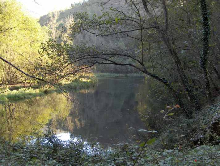 Leitzaran ibaia - Inturia aldean